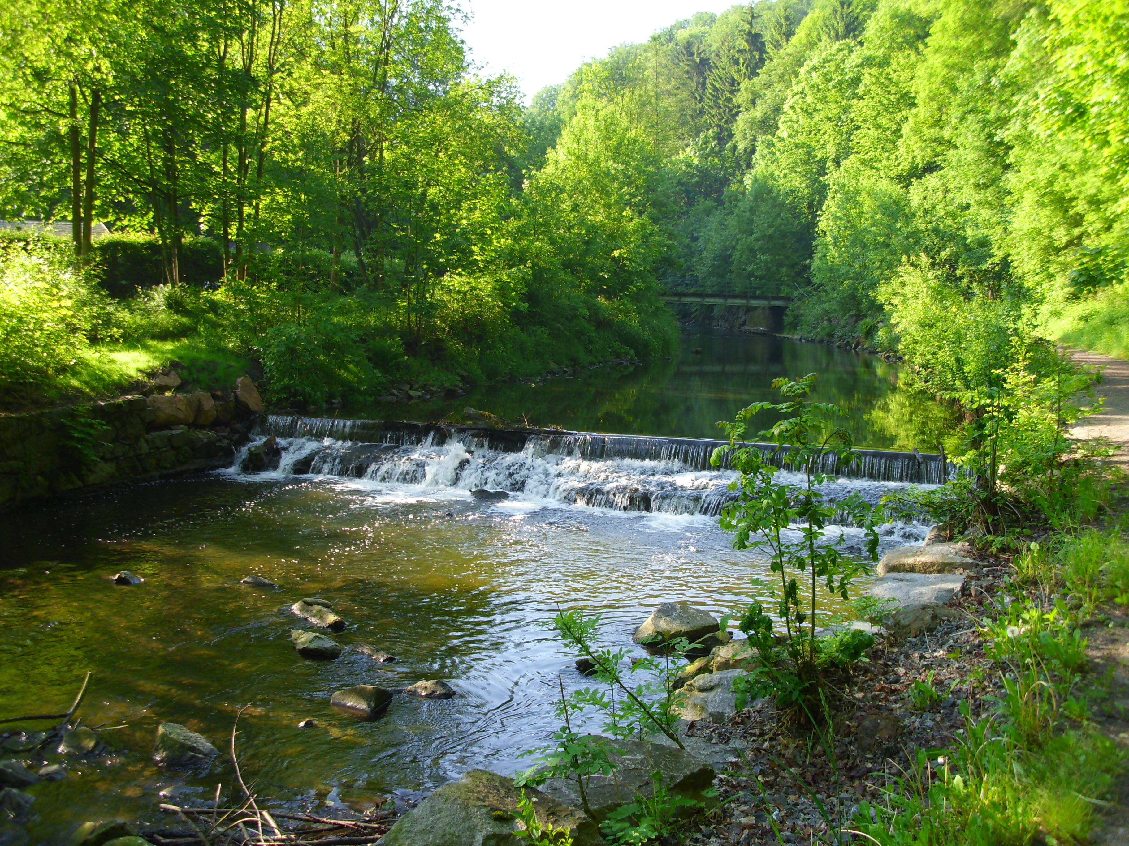 Hier befand sich ein Mühlenwehr, welches durch eine sogenannte Wassertreppe ersetzt wurde.